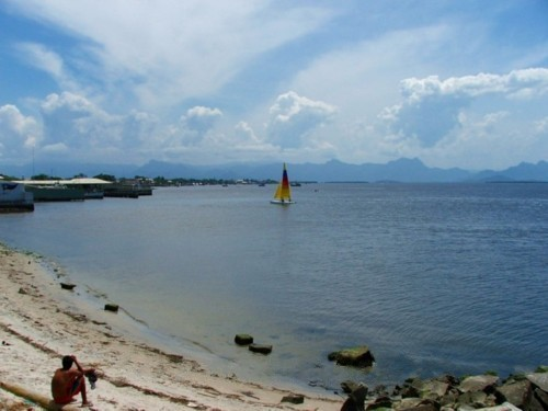 Baía de Guaratuba em Guaratuba. Removed caption read: Contemplando a Baia